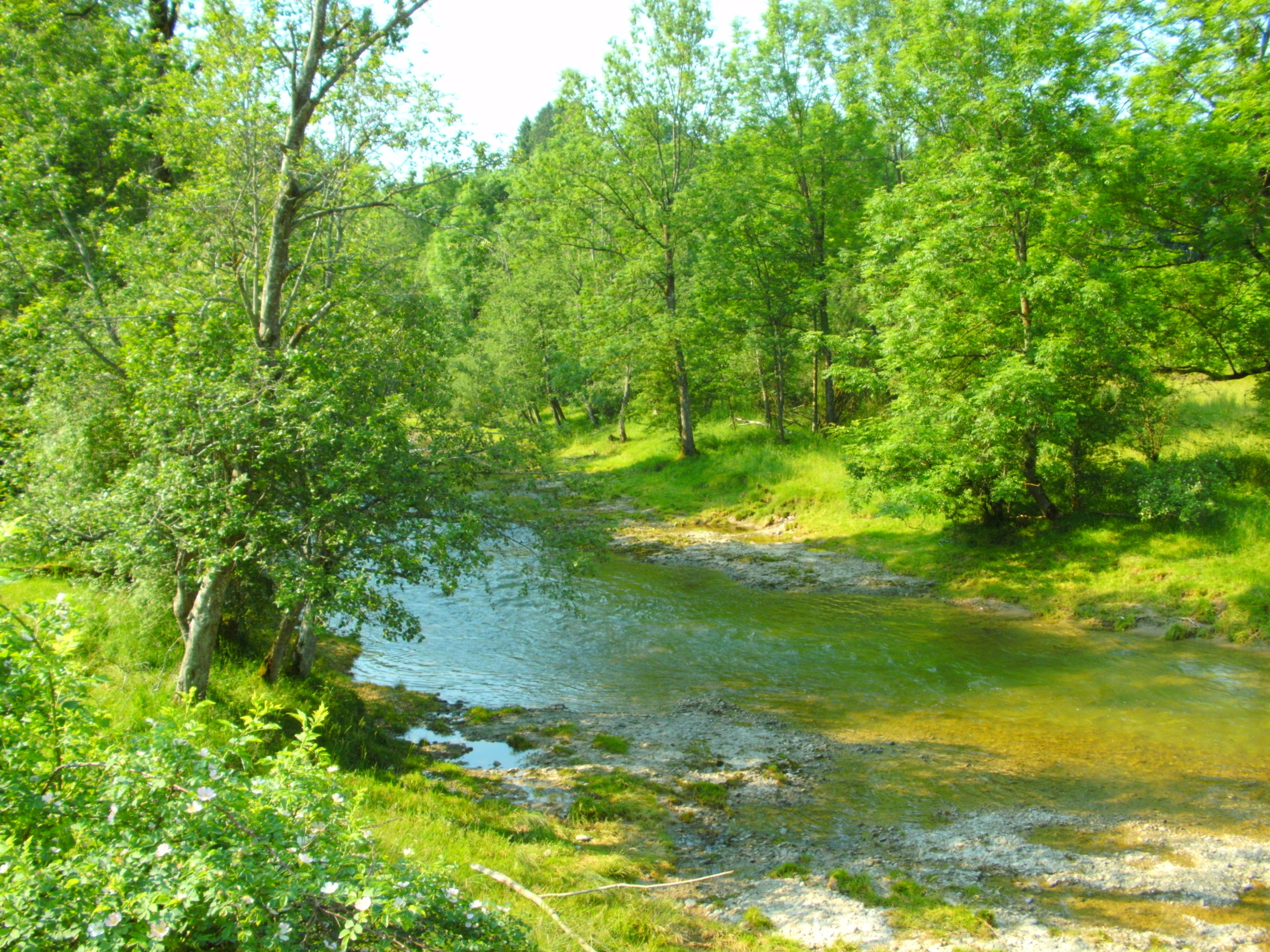 Römer Kastell Vemania Bettmauer Teilort von Isny im Allgäu - Untere Argen am Fuß der Bettmauer